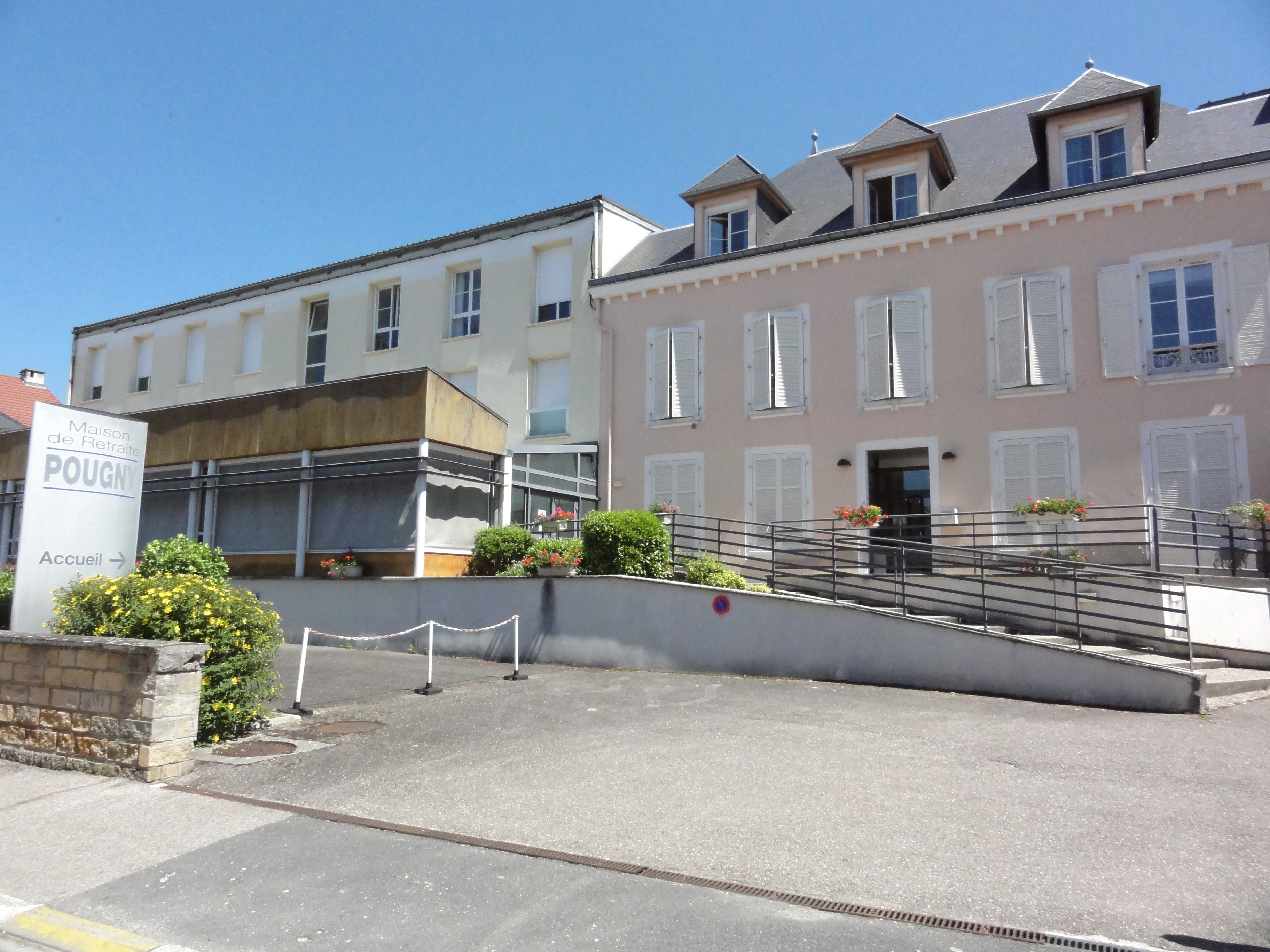 Doulaincourt, maison de retraite Pougny, rue de Pougny